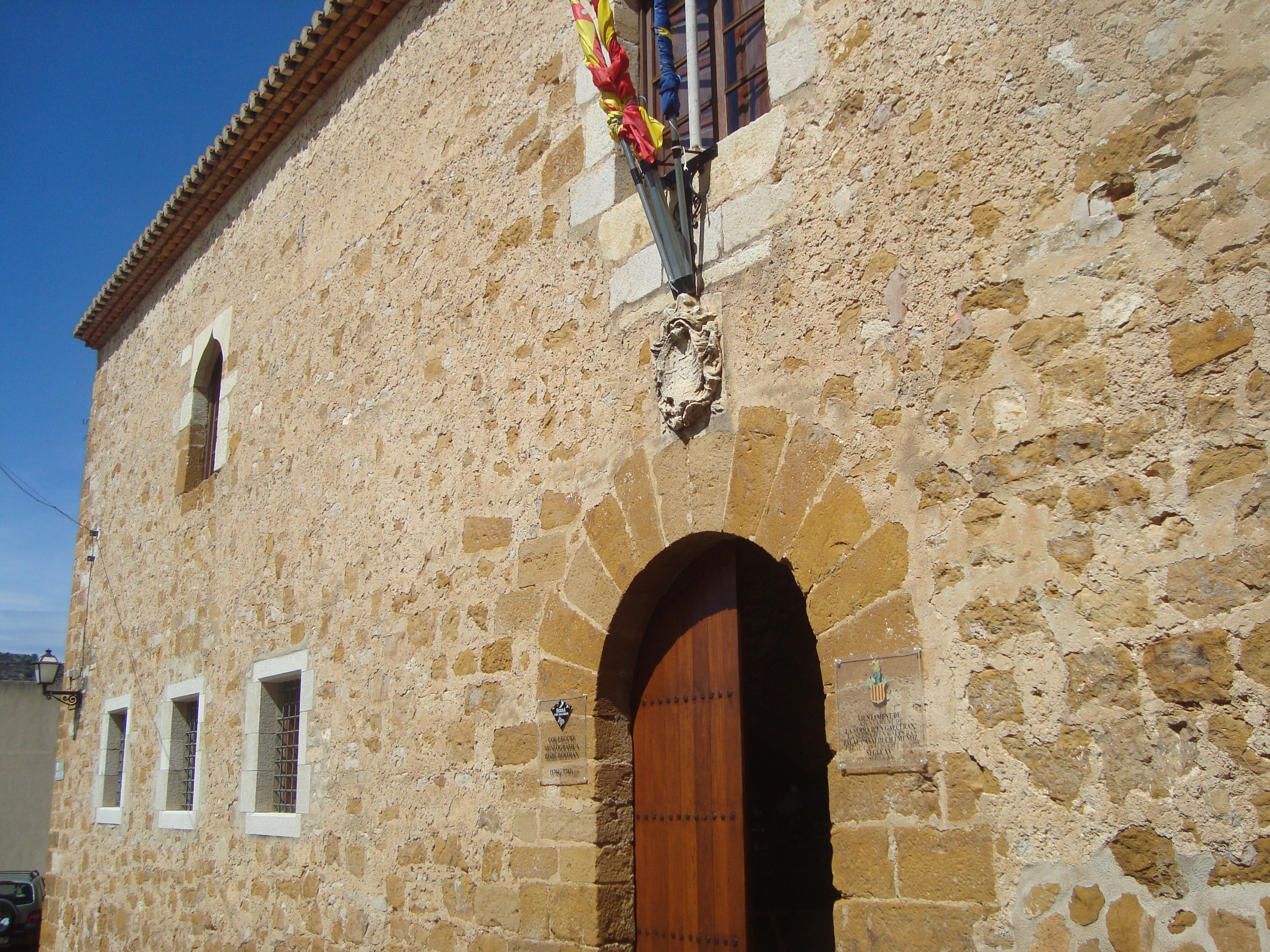 Palau dels Casalduch (la Serra d'en Galceran) 05.105-002.